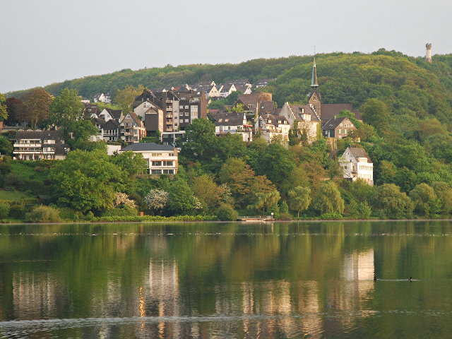 Blick über den Harkortsee zur Freiheit Wetter mit der Reformierten Kirche, Alt-Wetter, Wetter (Ruhr); oben rechts der Harkortturm auf dem Harkortberg